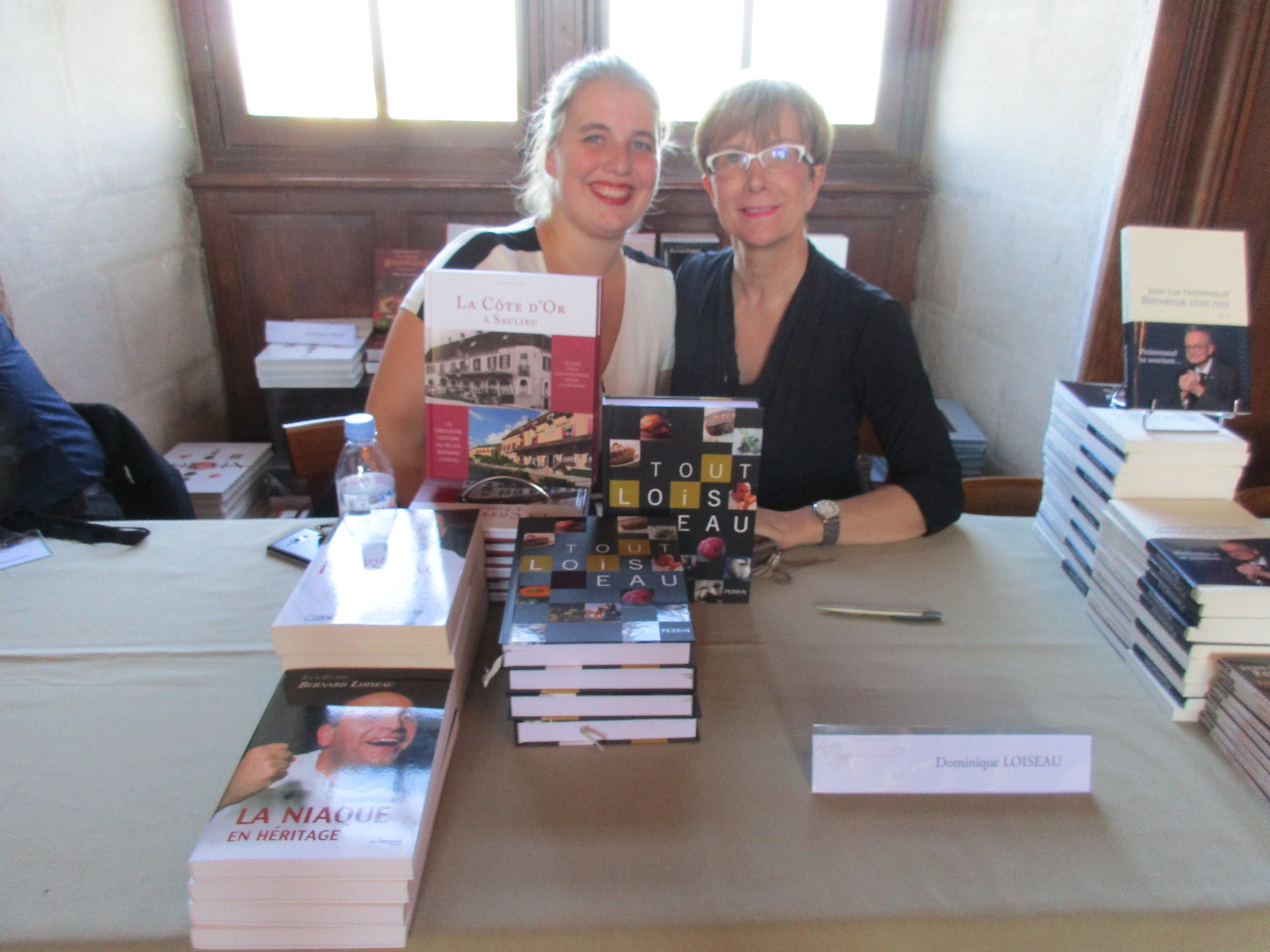 Dominique Loiseau, et sa fille, au salon Livres en Vignes 2016